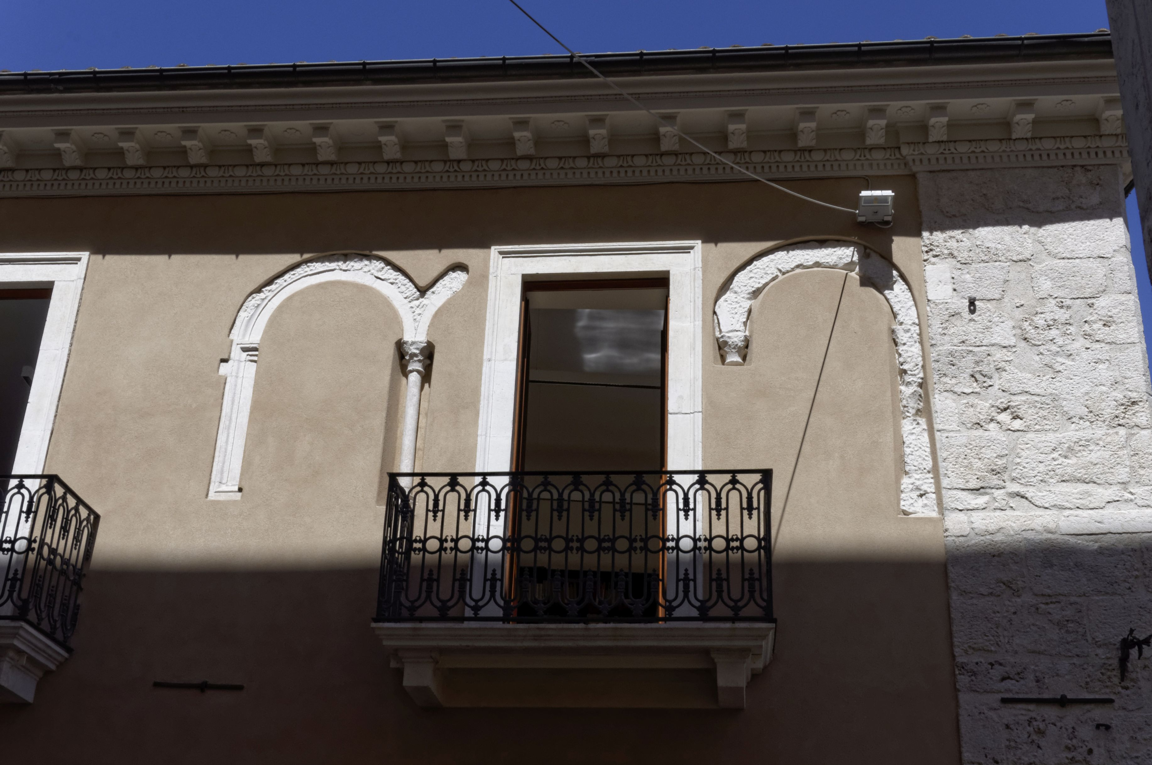 L'Aquila 2017 Dieses Foto entstand in Zusammenarbeit mit Stadtbesichtigungen.de Die Seiten Stadtbesichtigungen.de, der dazugehörige Reise Blog sowie die Facebookseite: Stadtbesichtigungen Rom dürfen dieses Bild für Ihre Veröffentlichungen ohne den Hinweis auf Wikipedia, Commons bzw der Lizenz verwenden. Die Verantwortlichen habe von mir (Ra Boe) die Originaldaten zur freien Verfügung übermittelt bekommen.